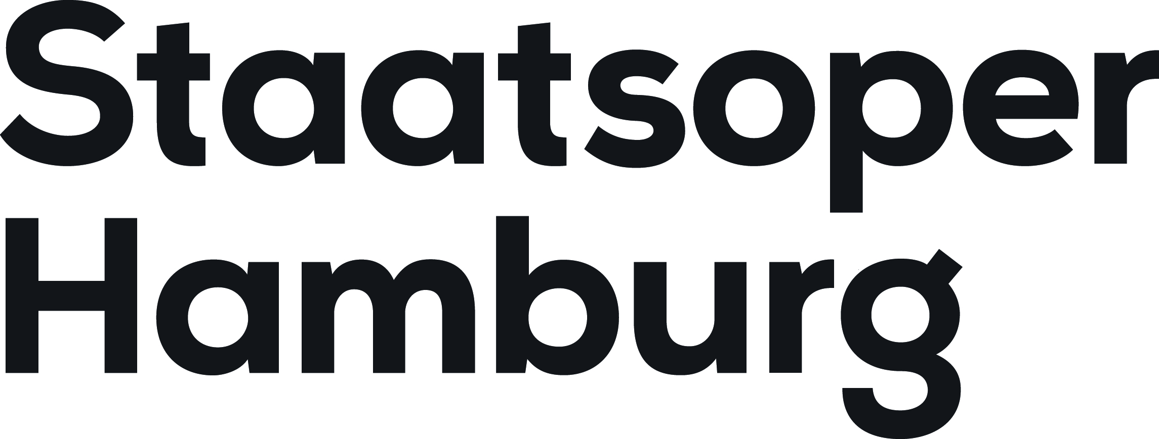 Logo der Hamburgischen Staatsoper